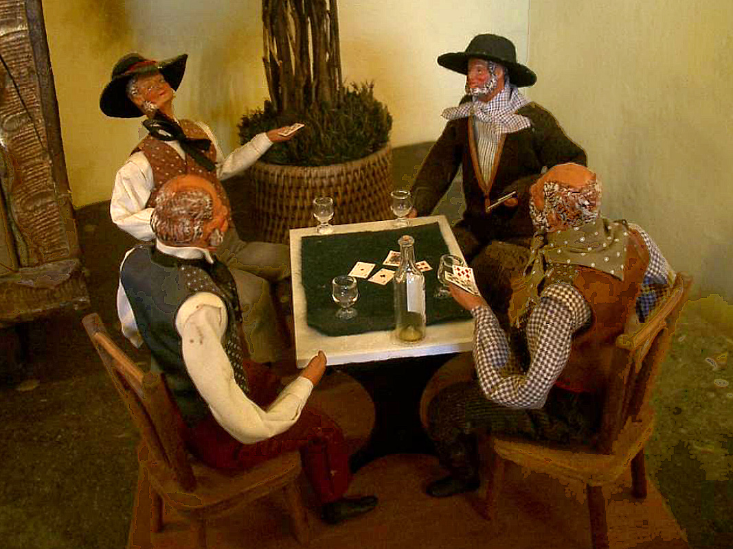 Les joueurs de la partie de cartes de Marcel Pagnol s'invitent à la crèche